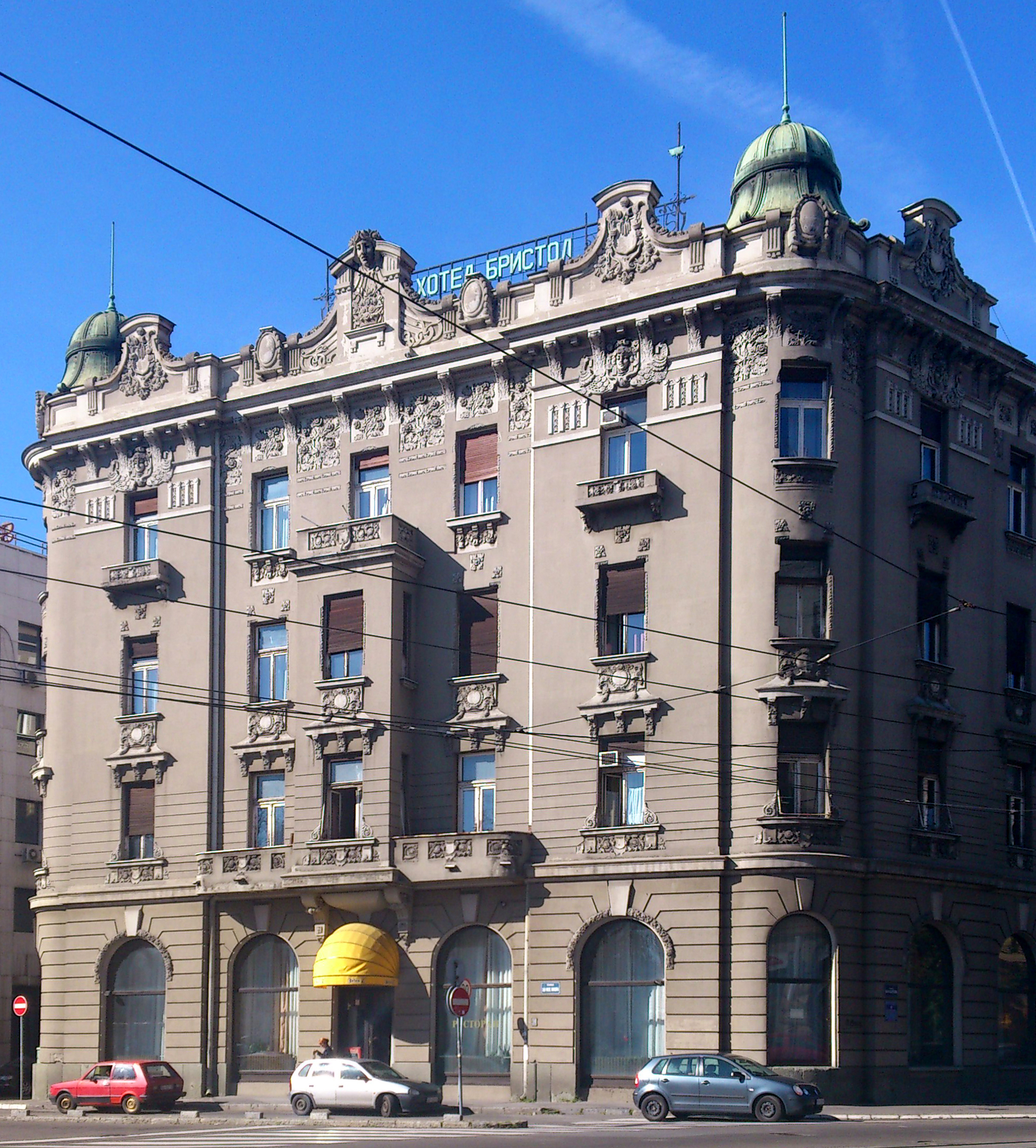 Beograd Hotel Bristol